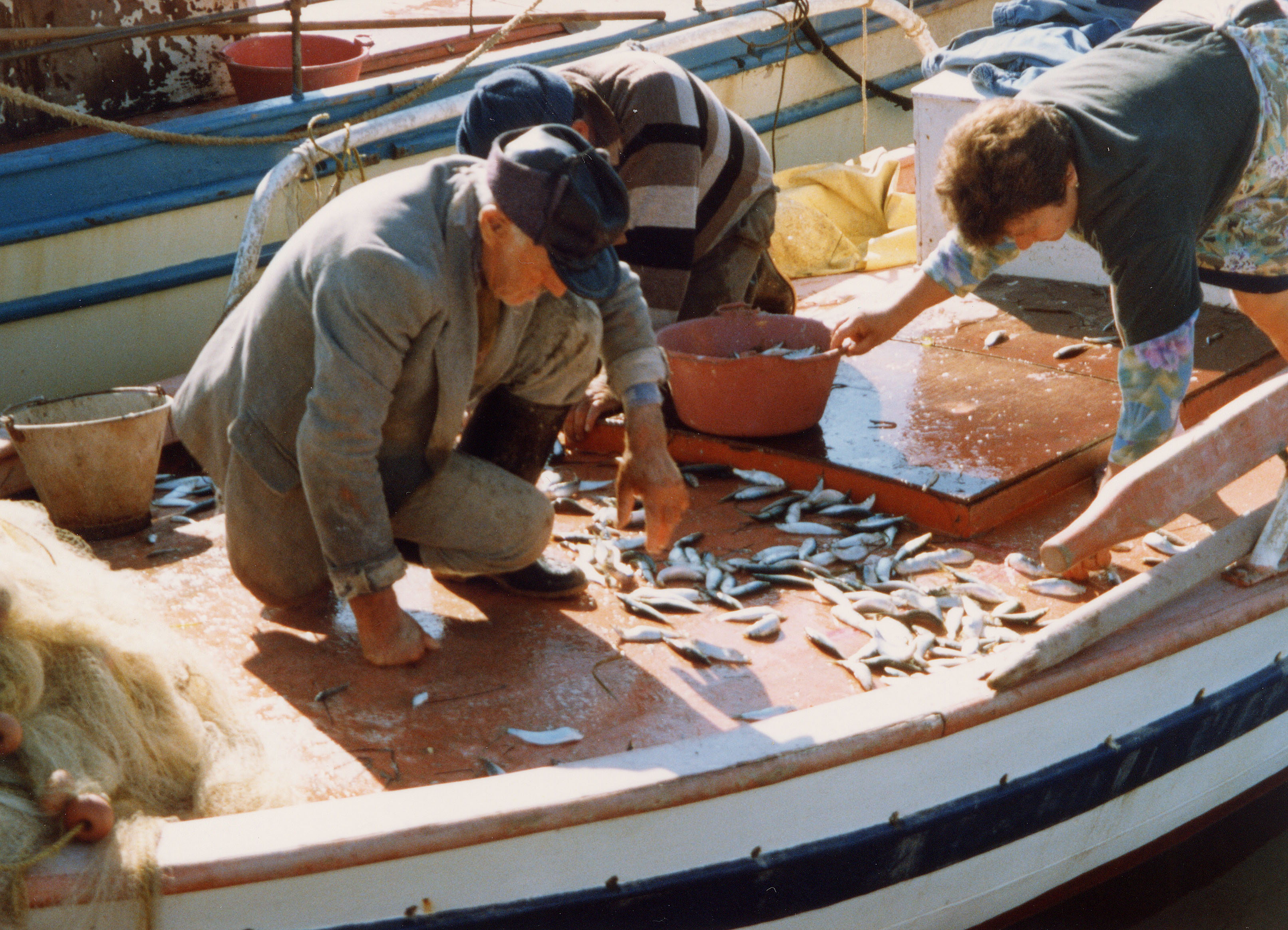 Sardientjes vangen, nog kleinschalig handwerk